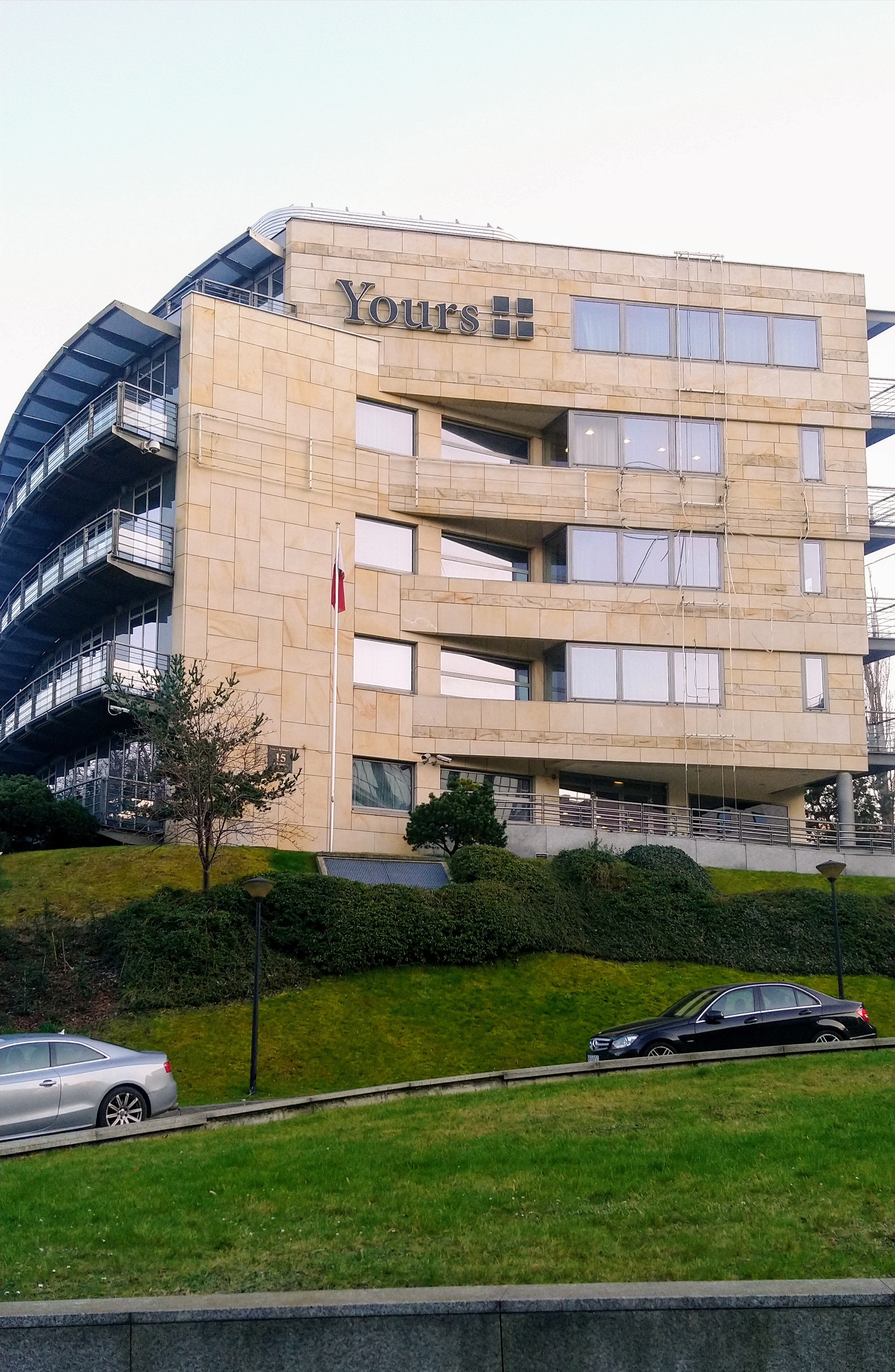 Ambasada Kataru